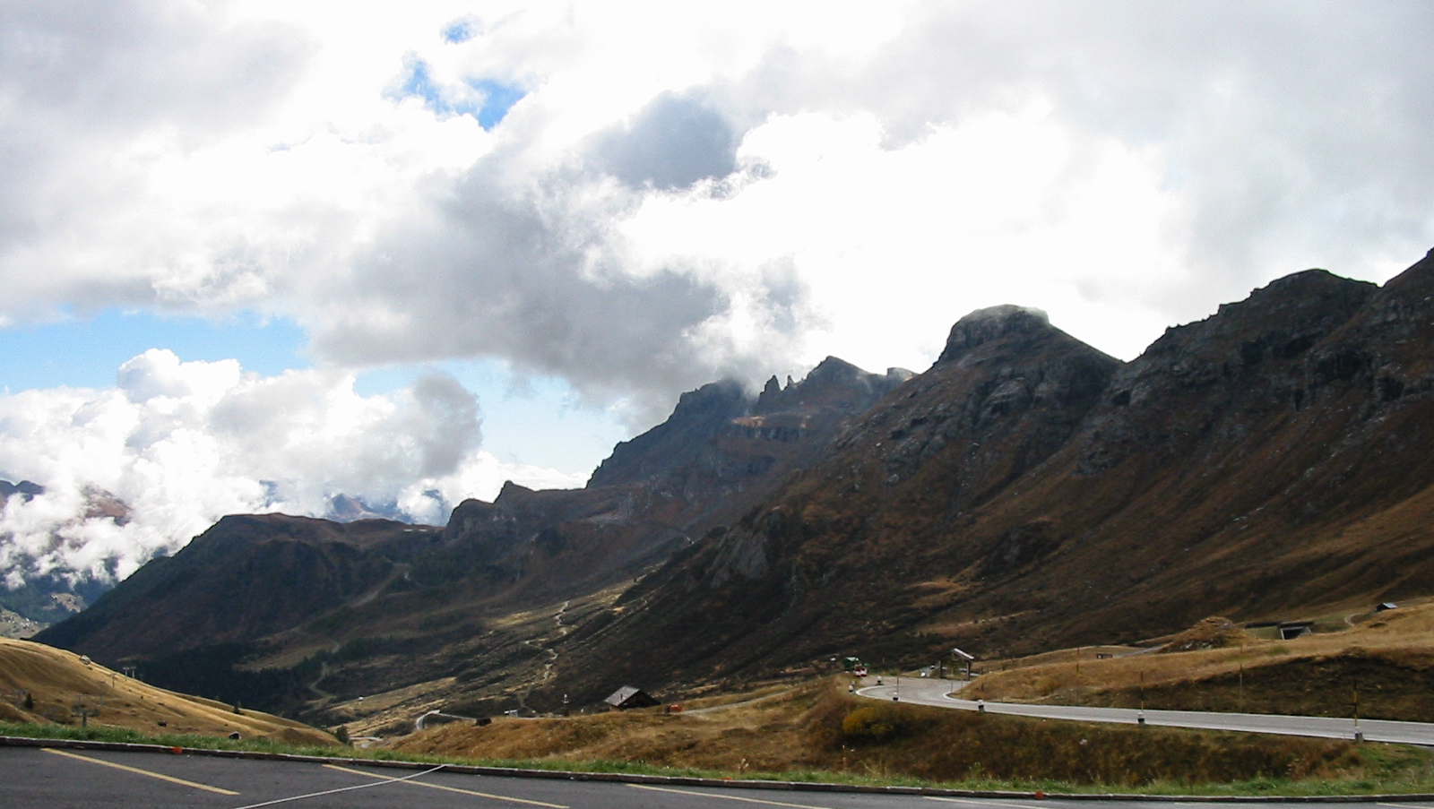 Padonkamm Nordseite vom Passo Pordoi aus, im Vordergrund die Paßstraße